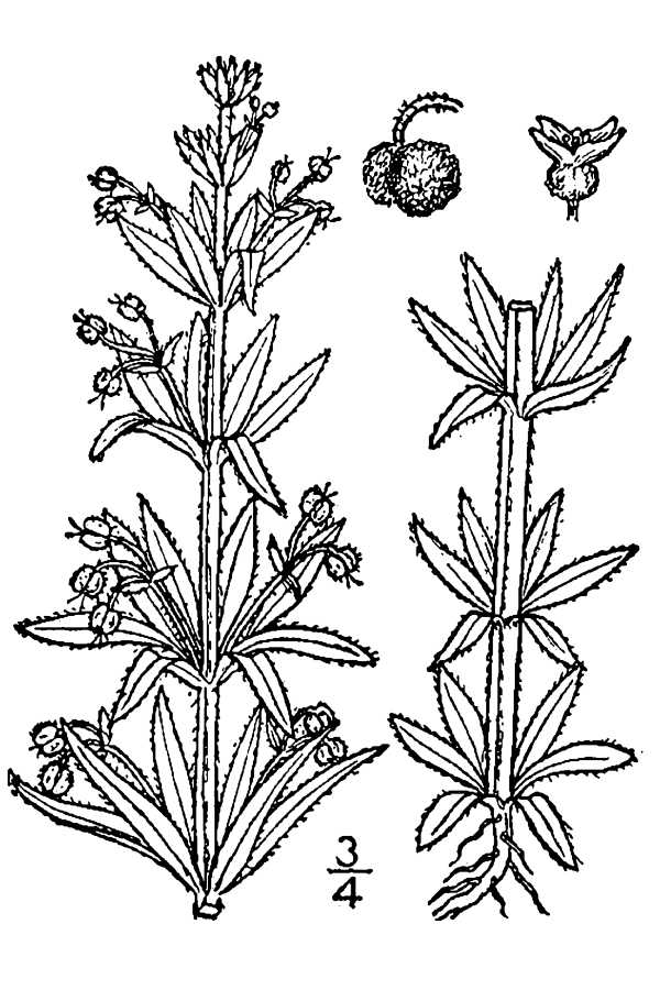 Galium tricornutum illustration